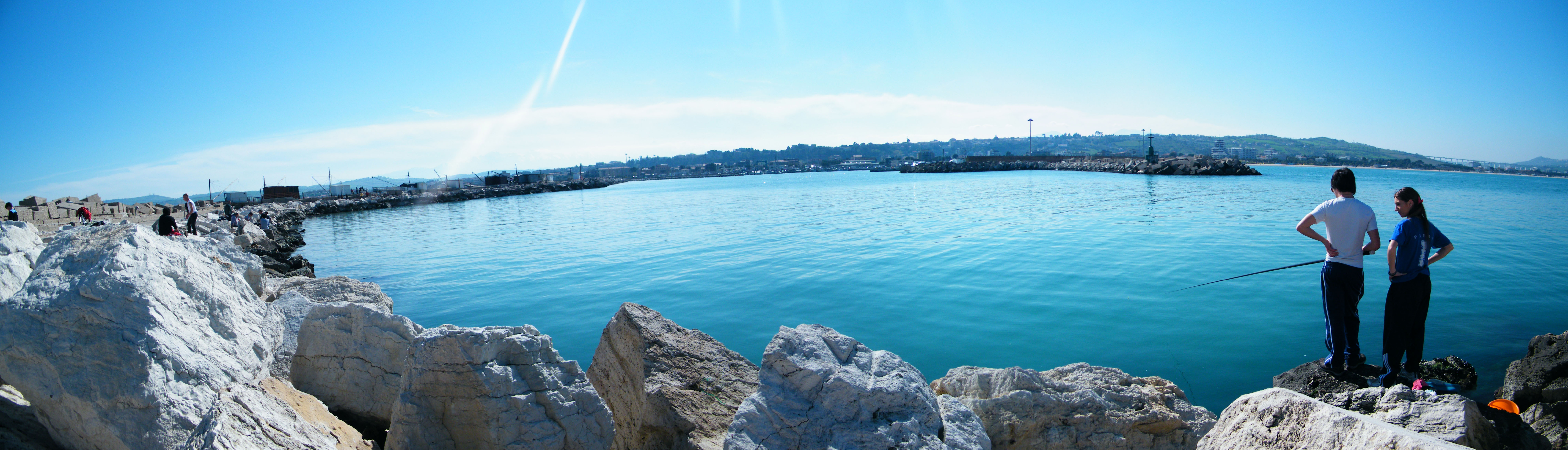 Foto panoramica dal molo Sud del porto di Giulianova